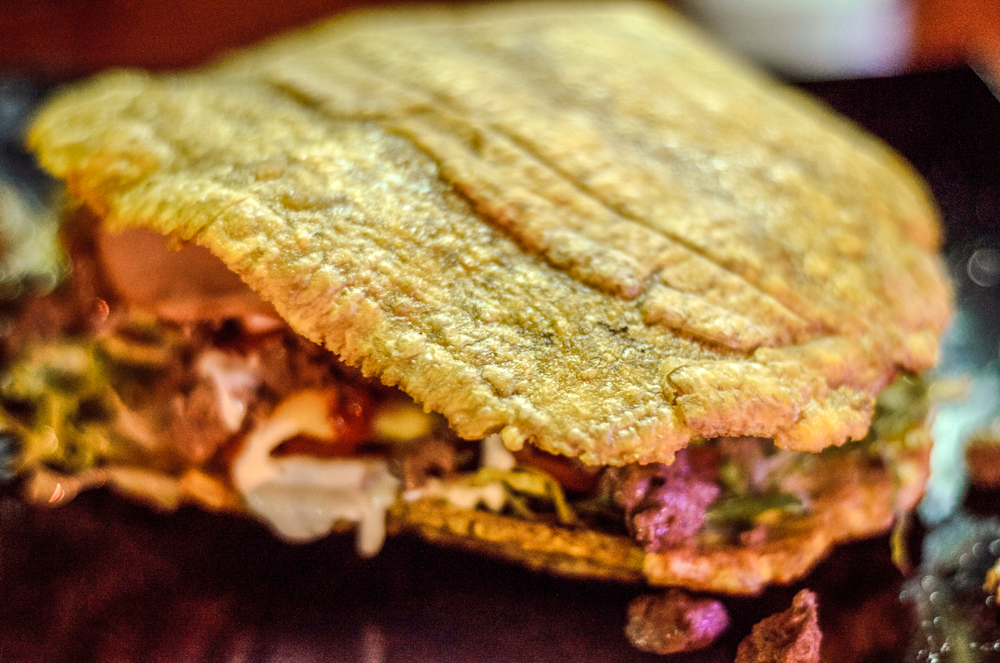 Patacones, comida típica y tradicional de Maracaibo.